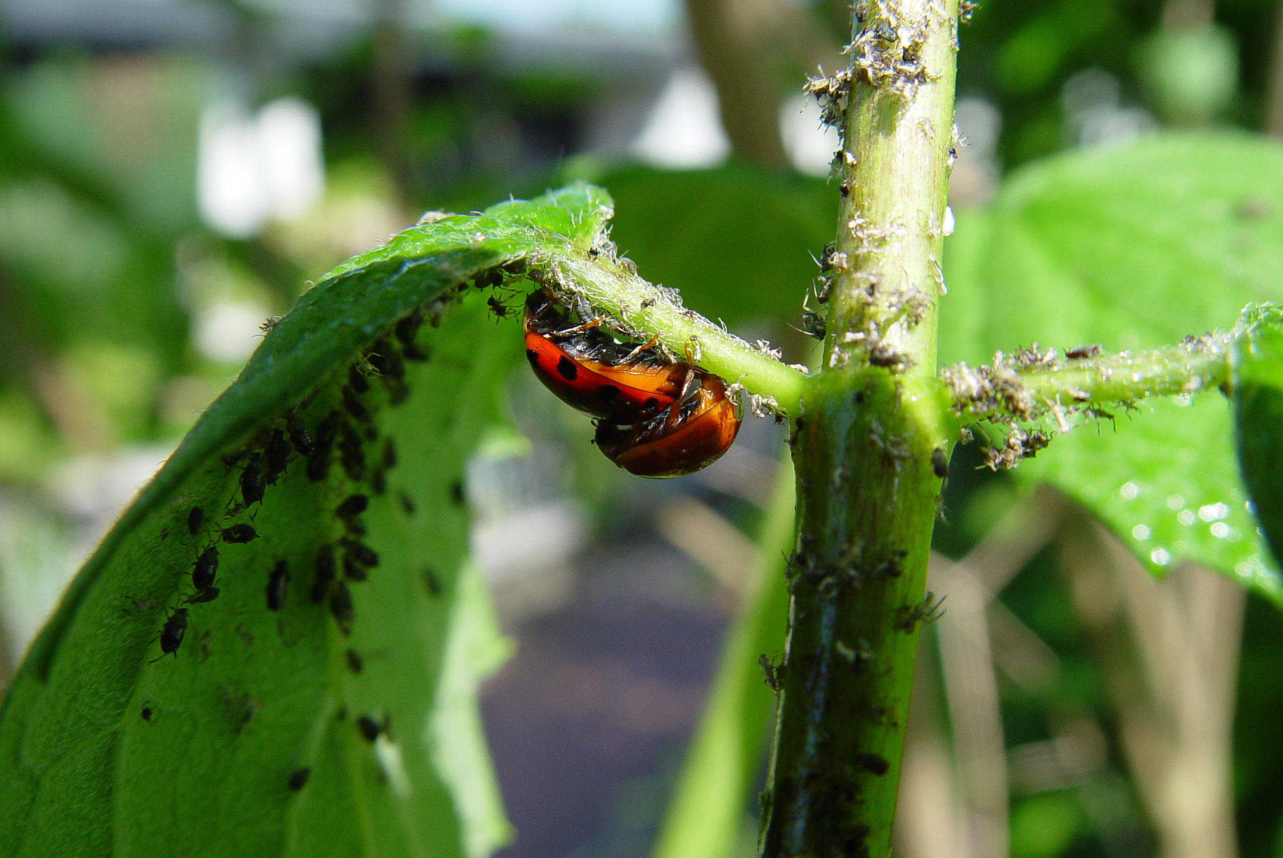 Marienkäfer Paar (Coccinella)